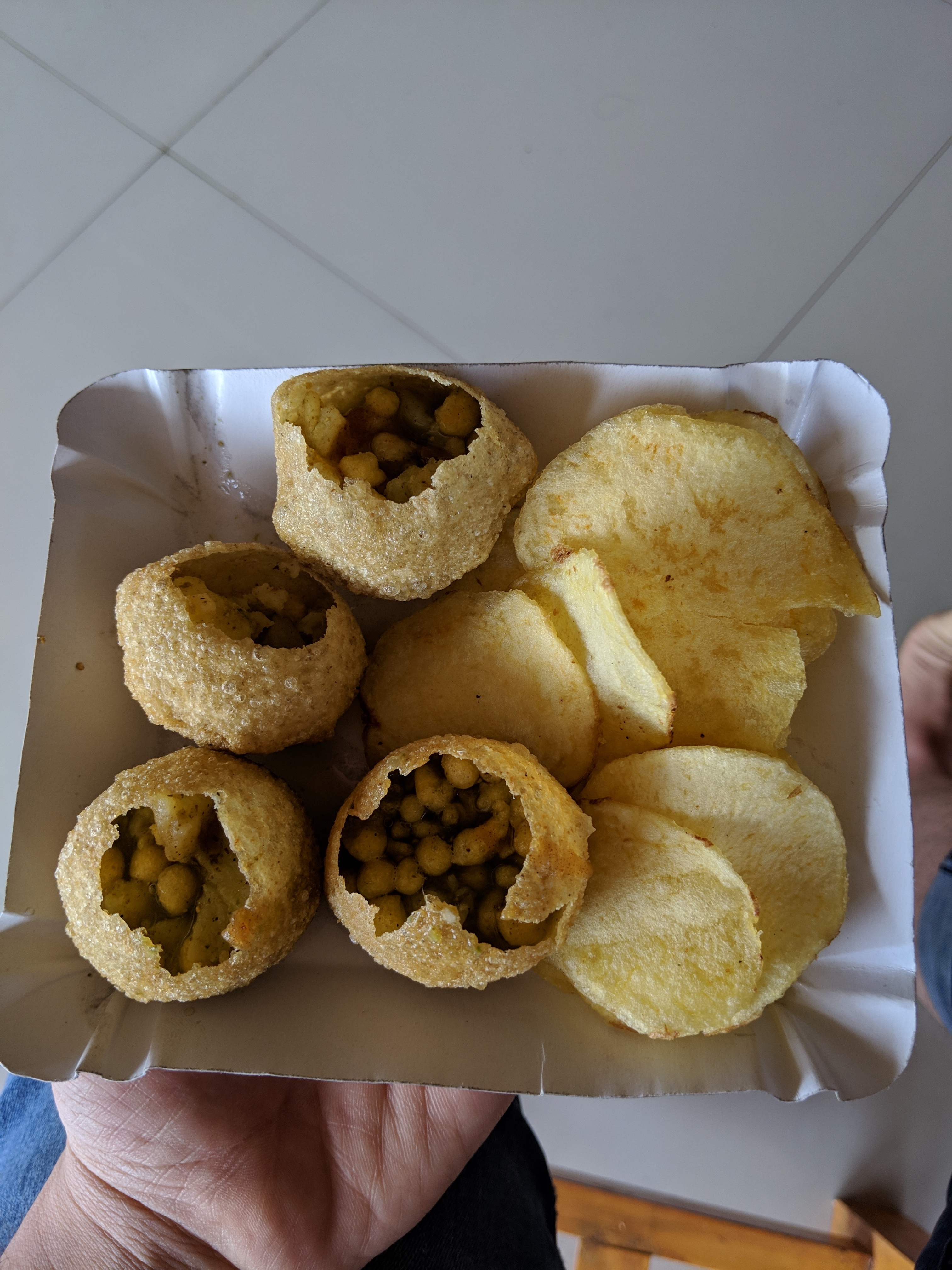 کوردی: پانی پوری، خواردنی هیندی